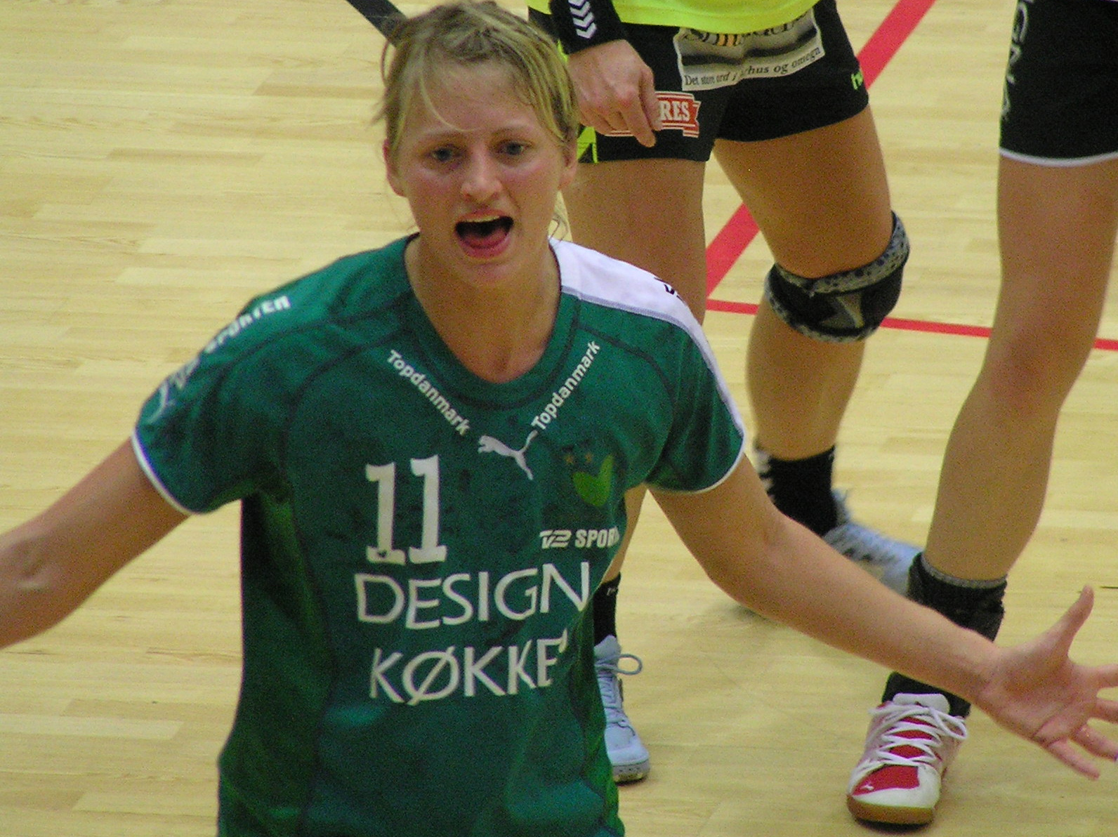 Danish national handball player, Lene Lund Nielsen. Author: Arne Møller Jensen, 2007-03-21